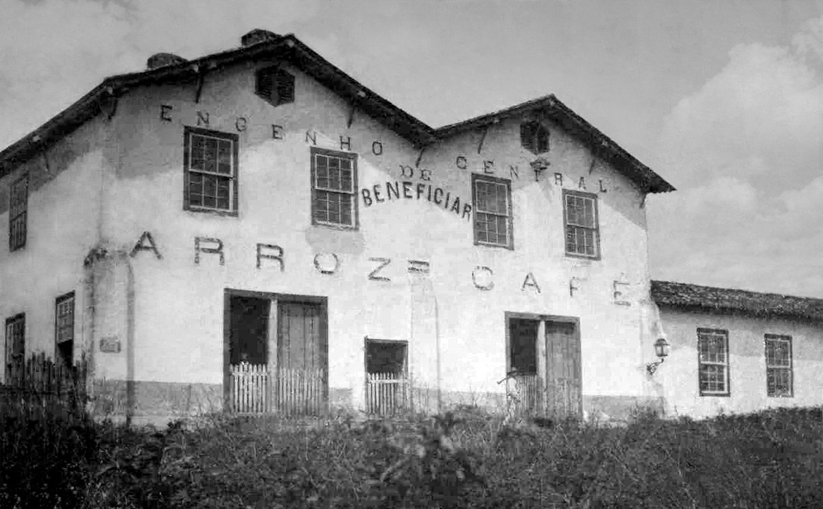 Em 5 de dezembro de 1882, era festivamente inaugurado, no Porto do Ribeira, o Engenho Central Casavecchia, de propriedade do oficial da Marinha Mercante Francisco Casavecchia e seu sócio Carlos Tolomei. Esse engenho se tornou notável pela perfeição de suas máquinas, que era o maior da região, o qual além de pilar 80 sacas de arroz por dia, ainda fabricava fubá de arroz e de milho “de modo a competir com os fabricados nos melhores estabelecimentos estrangeiros”.